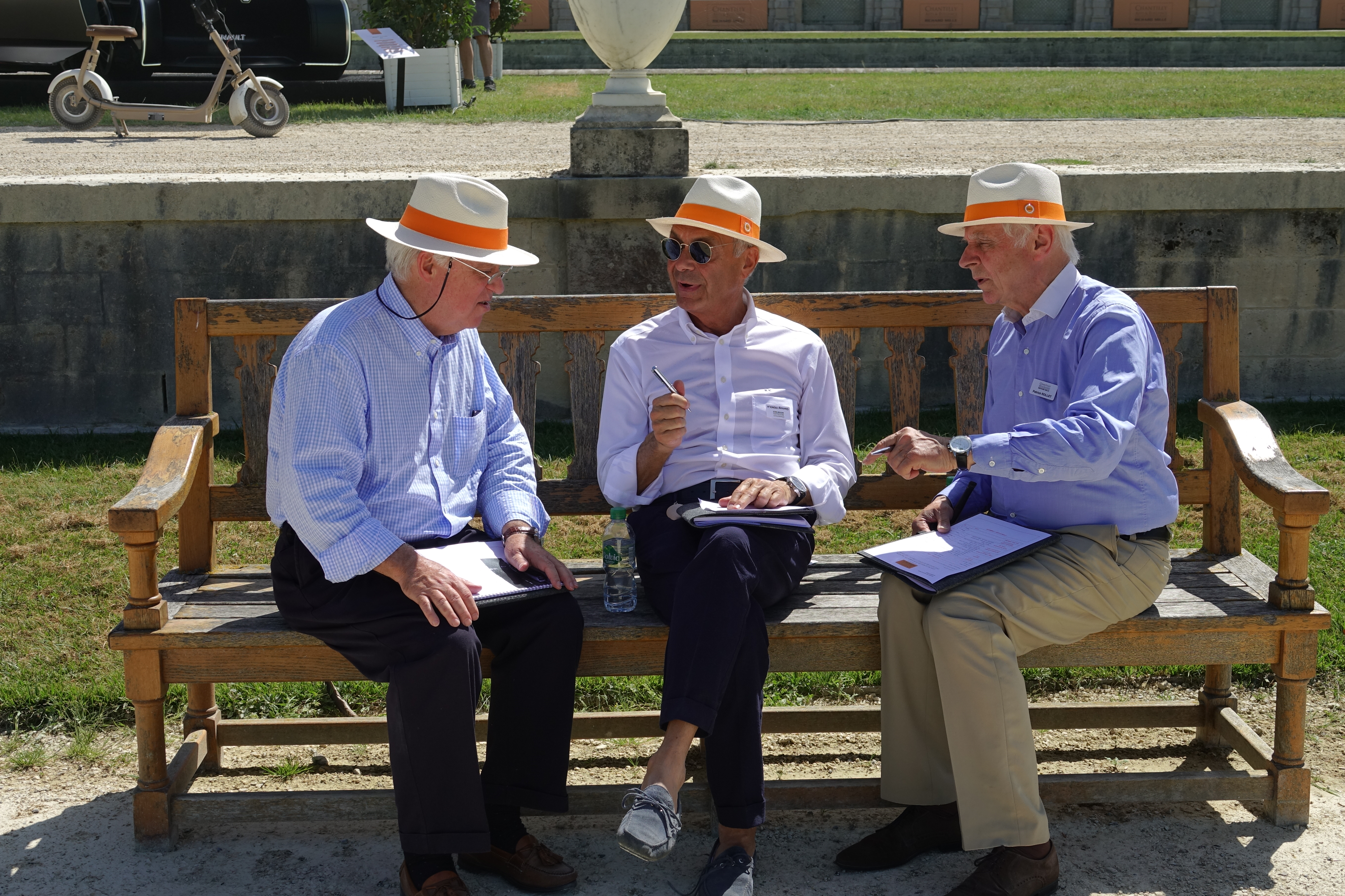 Jury du Chantilly Arts & Elegance Richard Mille 2019 (Gianluigi Vignola, Patrick Rollet, ...)